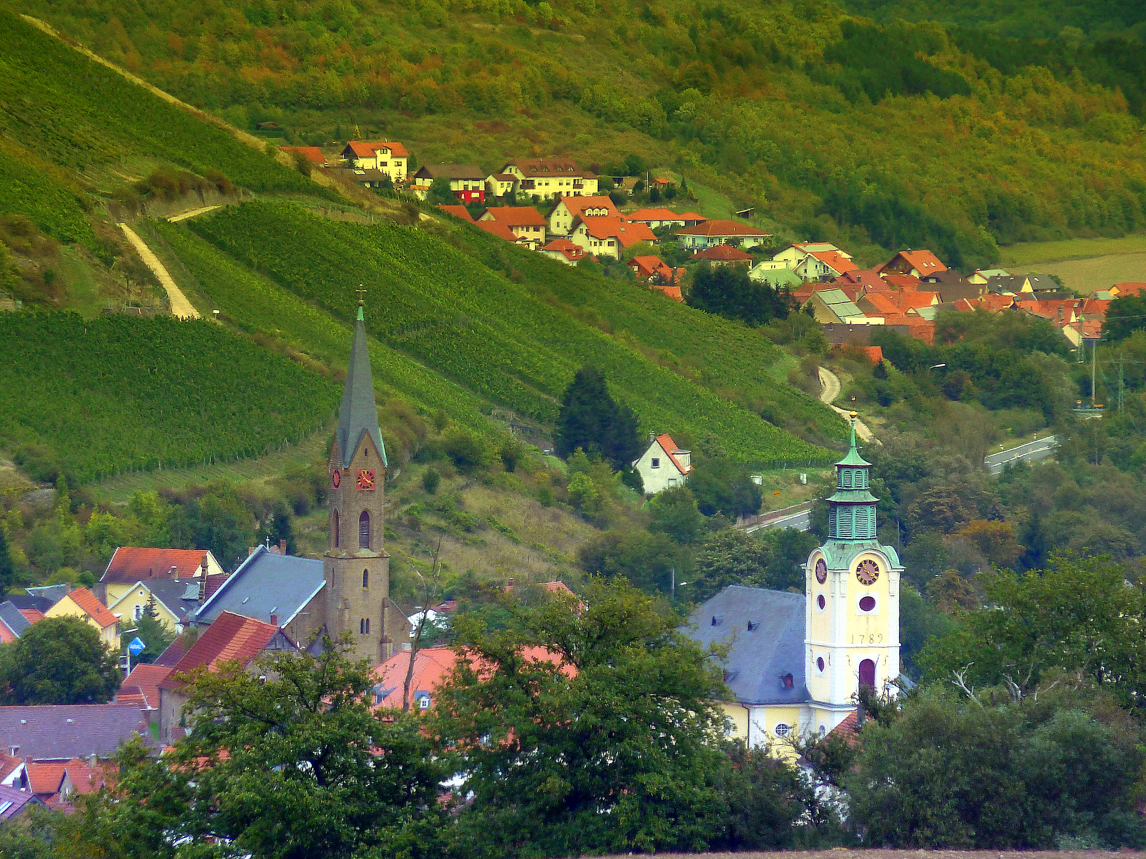 Die Kirchturmspitzen von Obermoschel